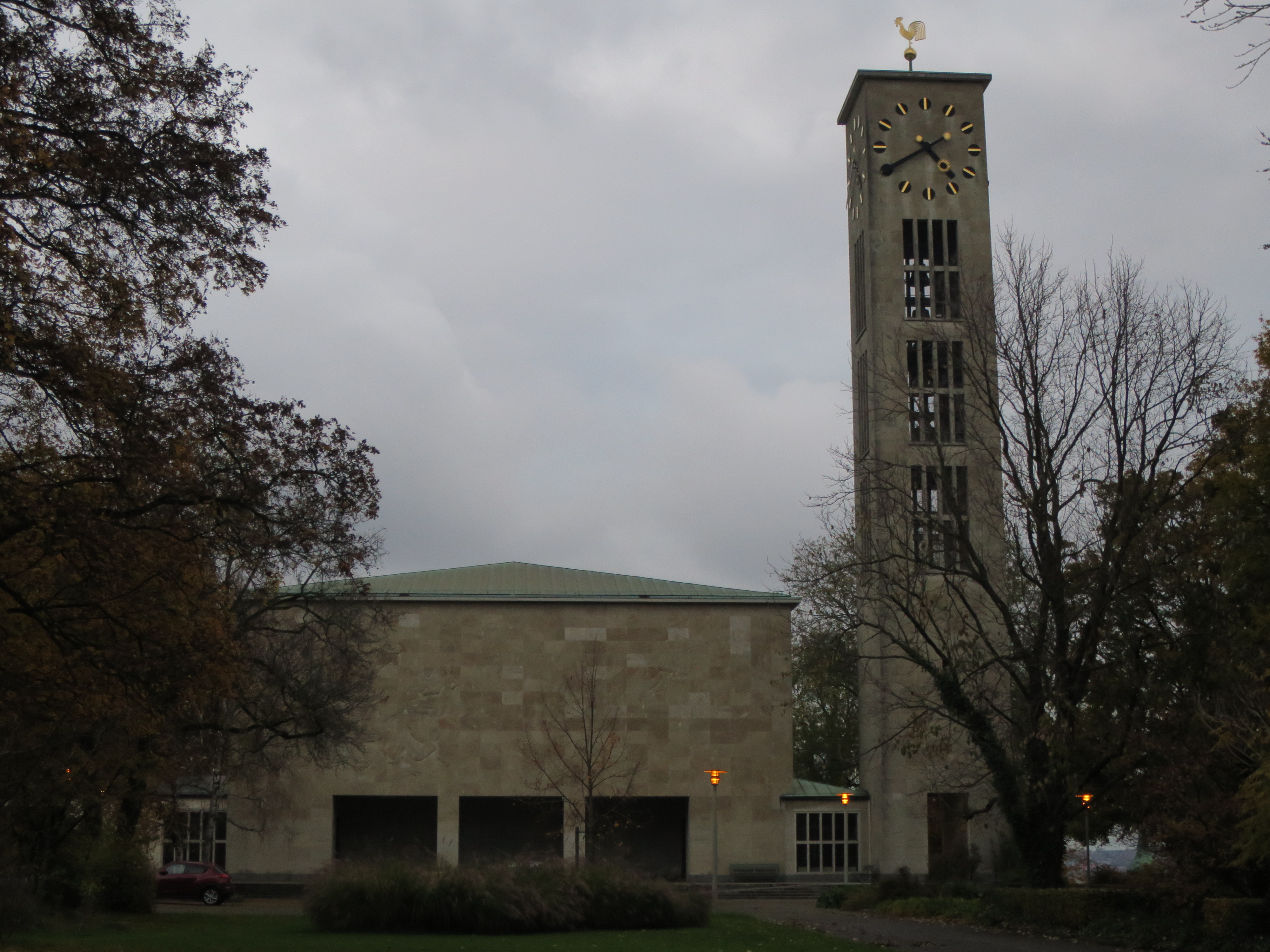 Hauptfassade mit Turm